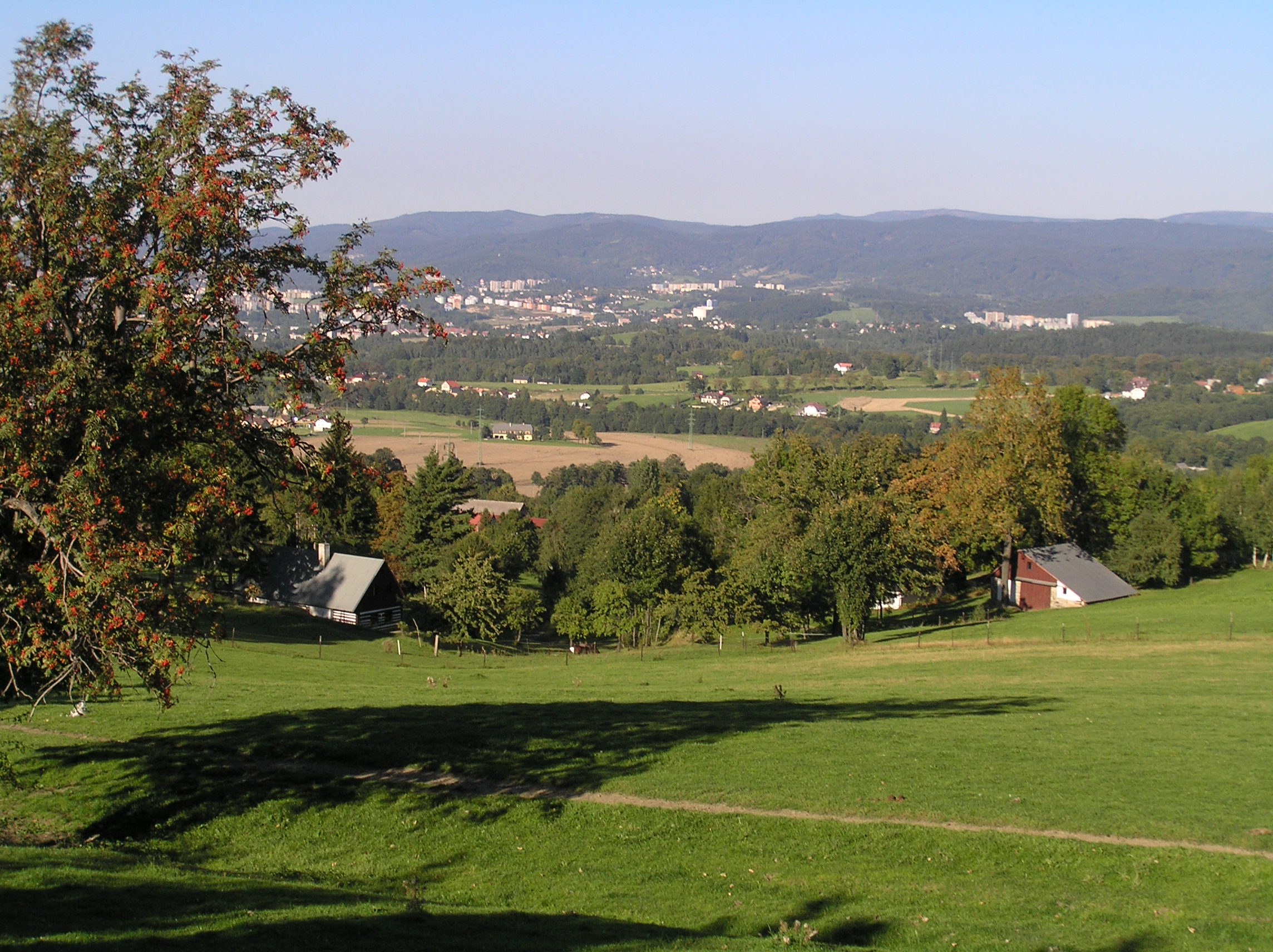 Šimonovice